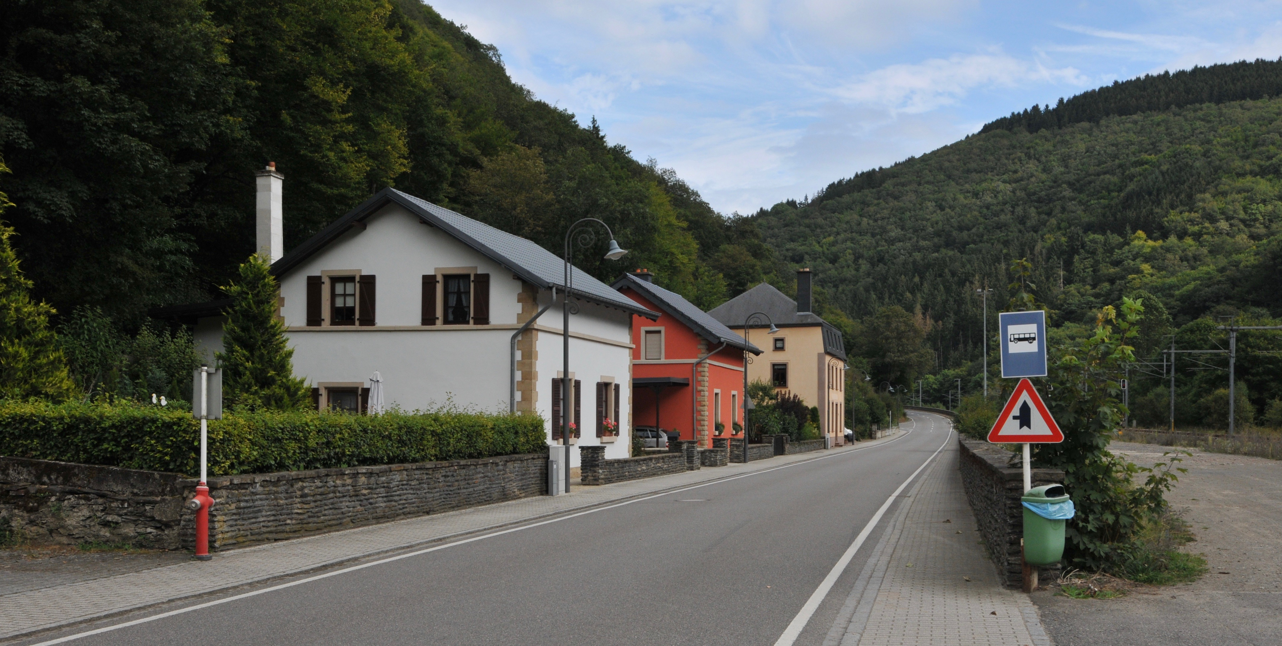 Giewelsmillen. This photograph was taken with a Nikon D300